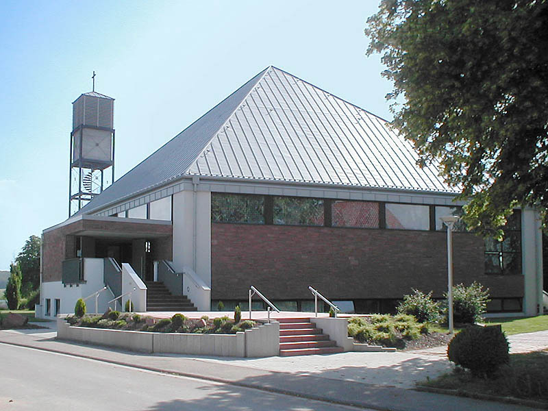 Katholische Kirche in Sinsheim-Hoffenheim // Catholic church in Sinsheim-Hoffenheim, germany